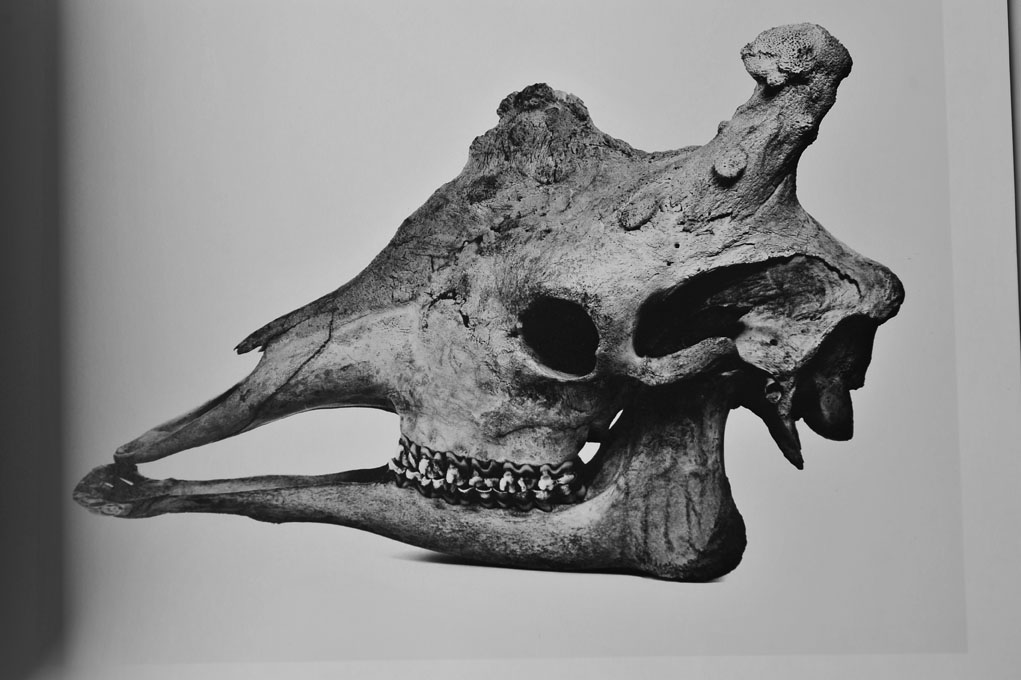 Photograph from Jiří Poláček´s archive.